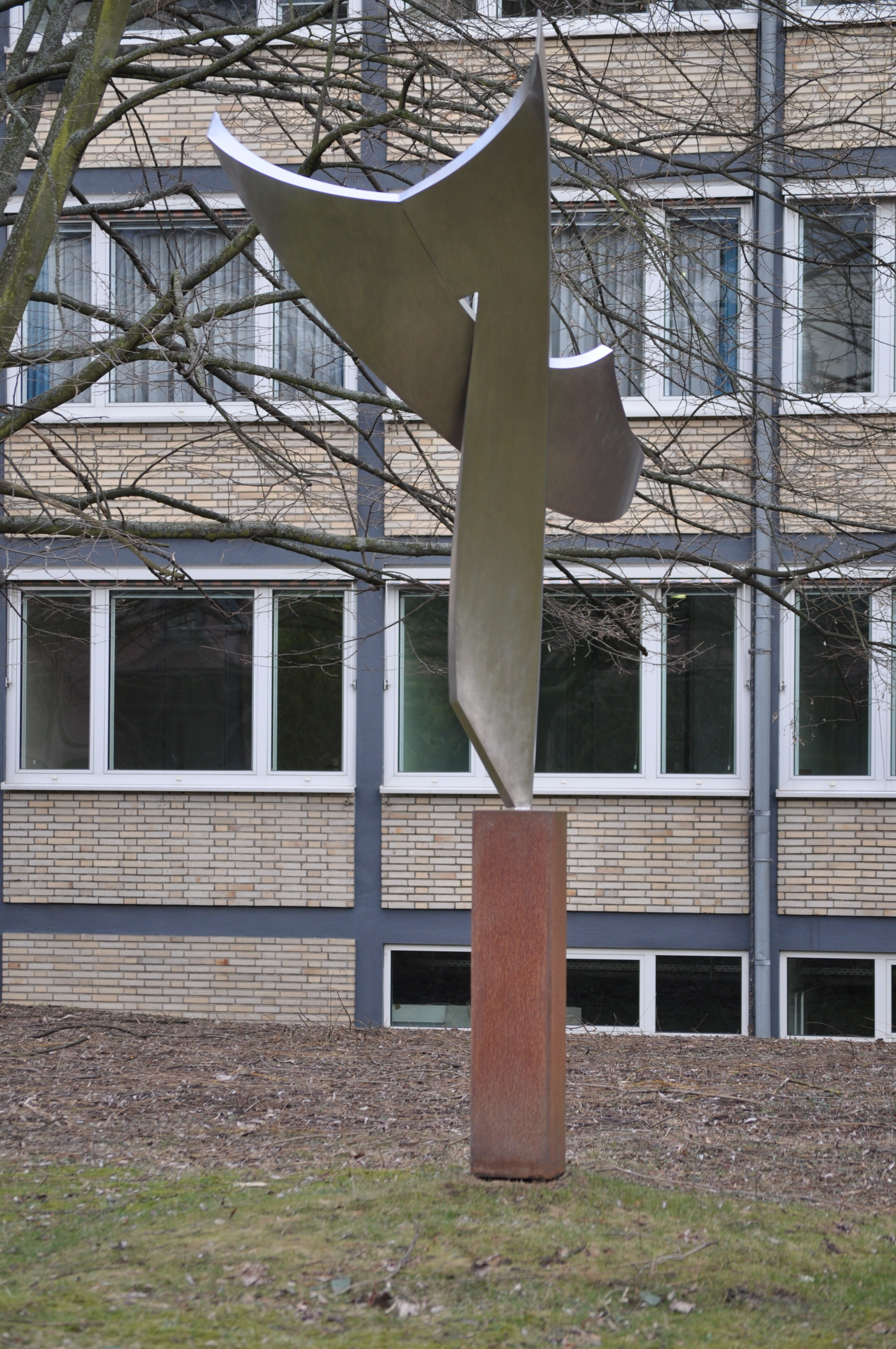 Skulptur "Tanz Solo" von Karl Menzen, 2008, Edelstahl Format 340*180*200 com, heute dauerhaft in der Skulpturenallee Bad Homburg ausgestellt